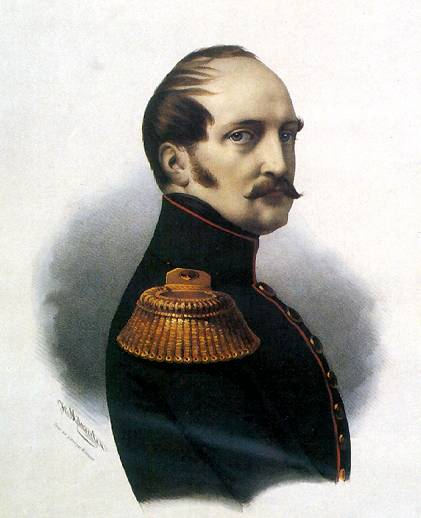 царь Николай Первый